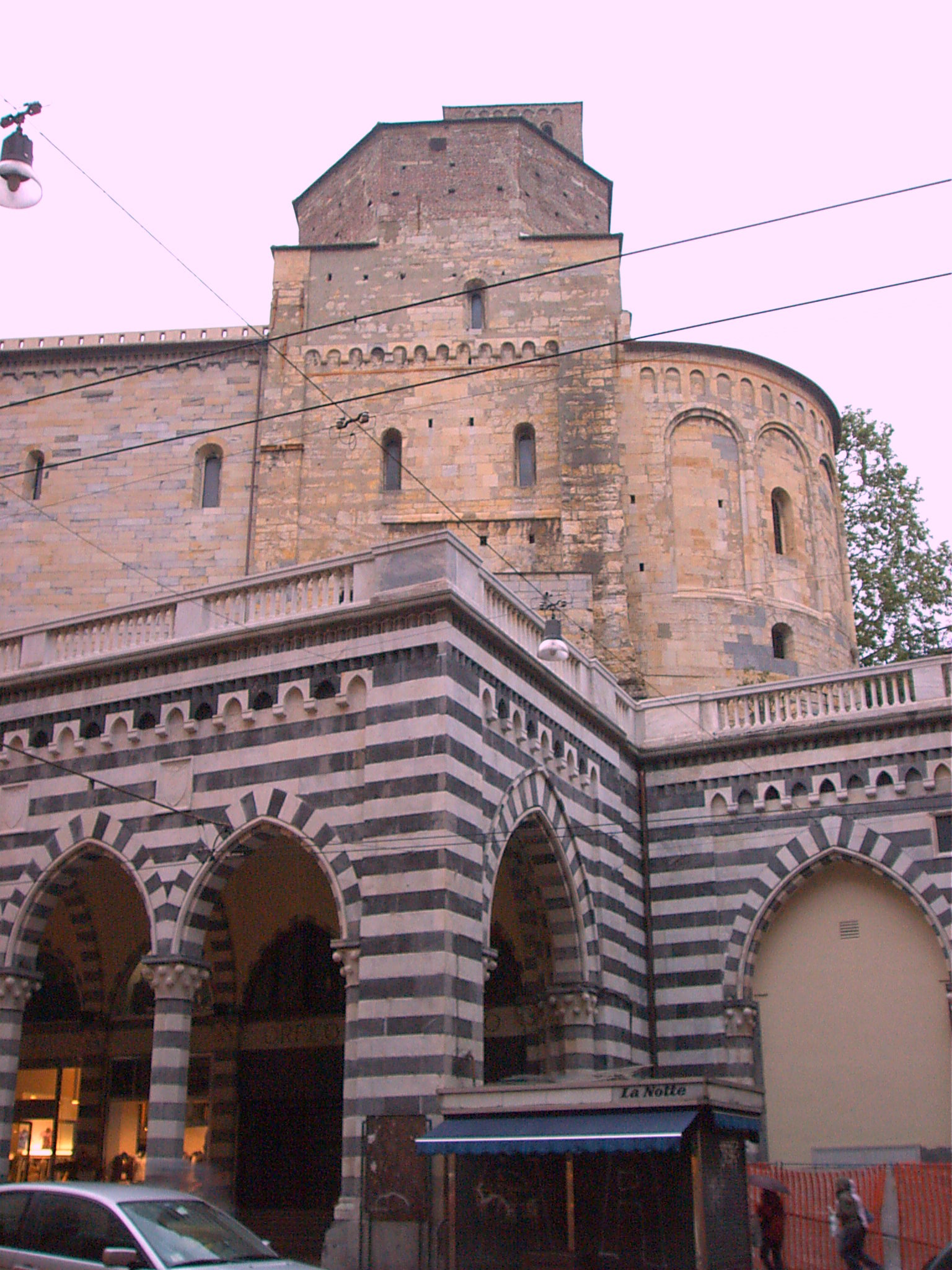 Chiesa di Santo Stefano vista da Via XX Settembre, Genova